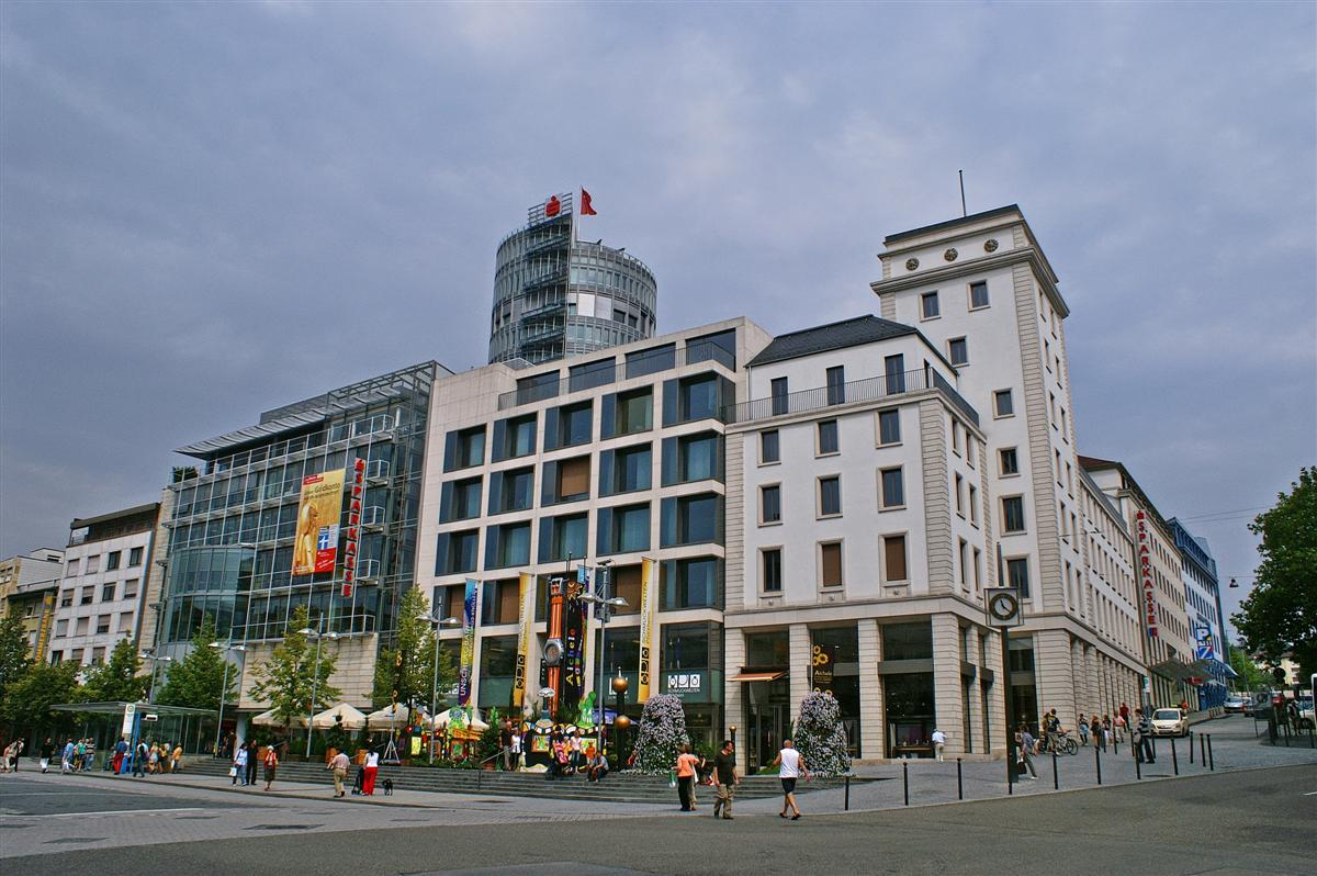 Industriehaus Pforzheim mit Sparkassenturm